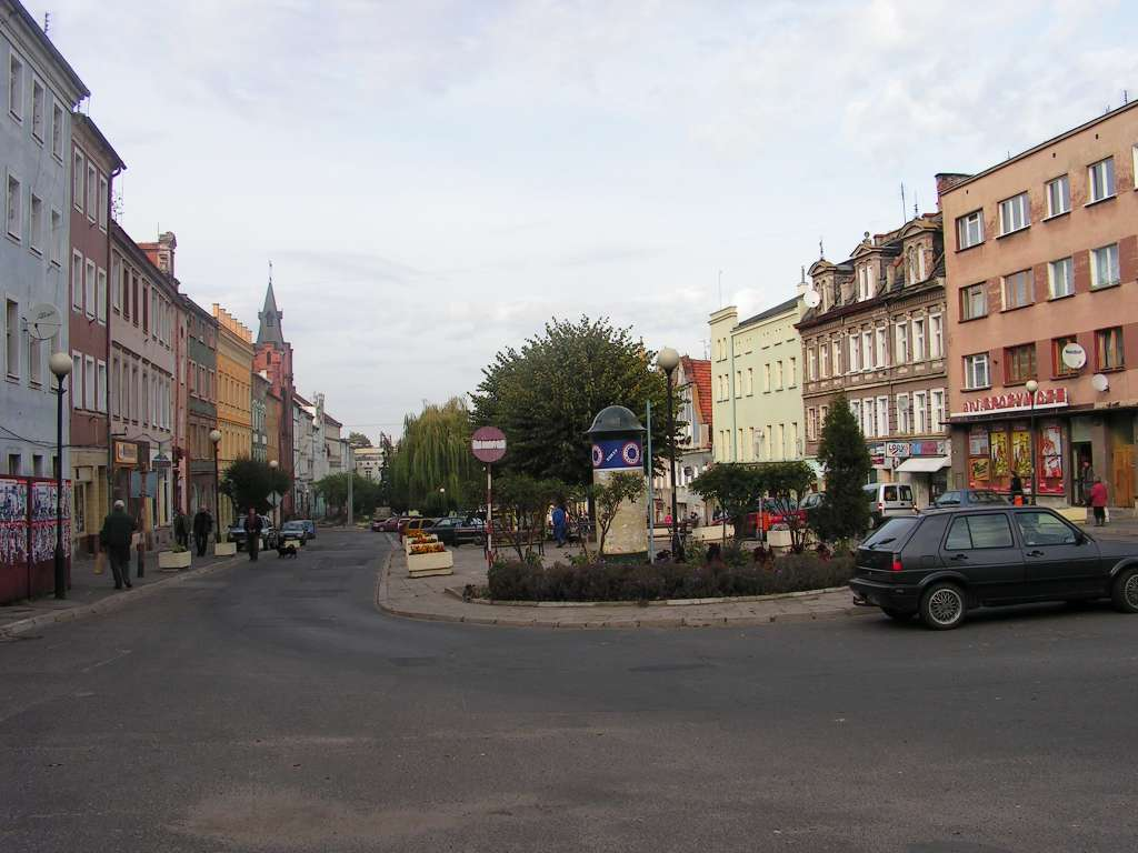 Rynek w Niemczy, autor Lzur